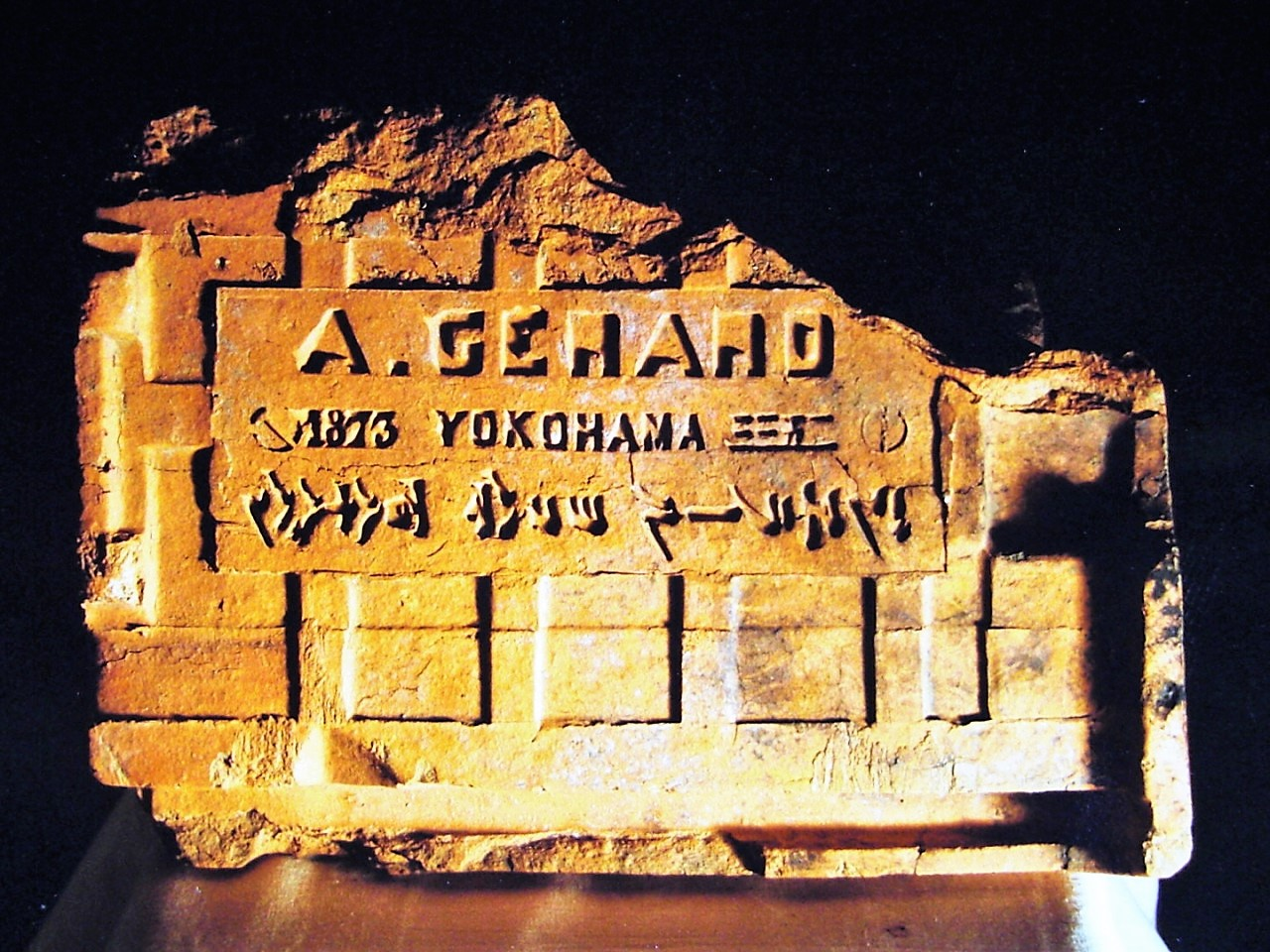 1873年製ジェラール瓦 横浜 元町公園出土